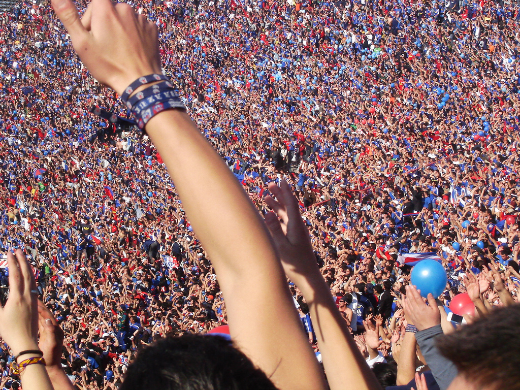 Barra de Los de Abajo apoyando a Universidad de Chile durante el Clásico Universitario